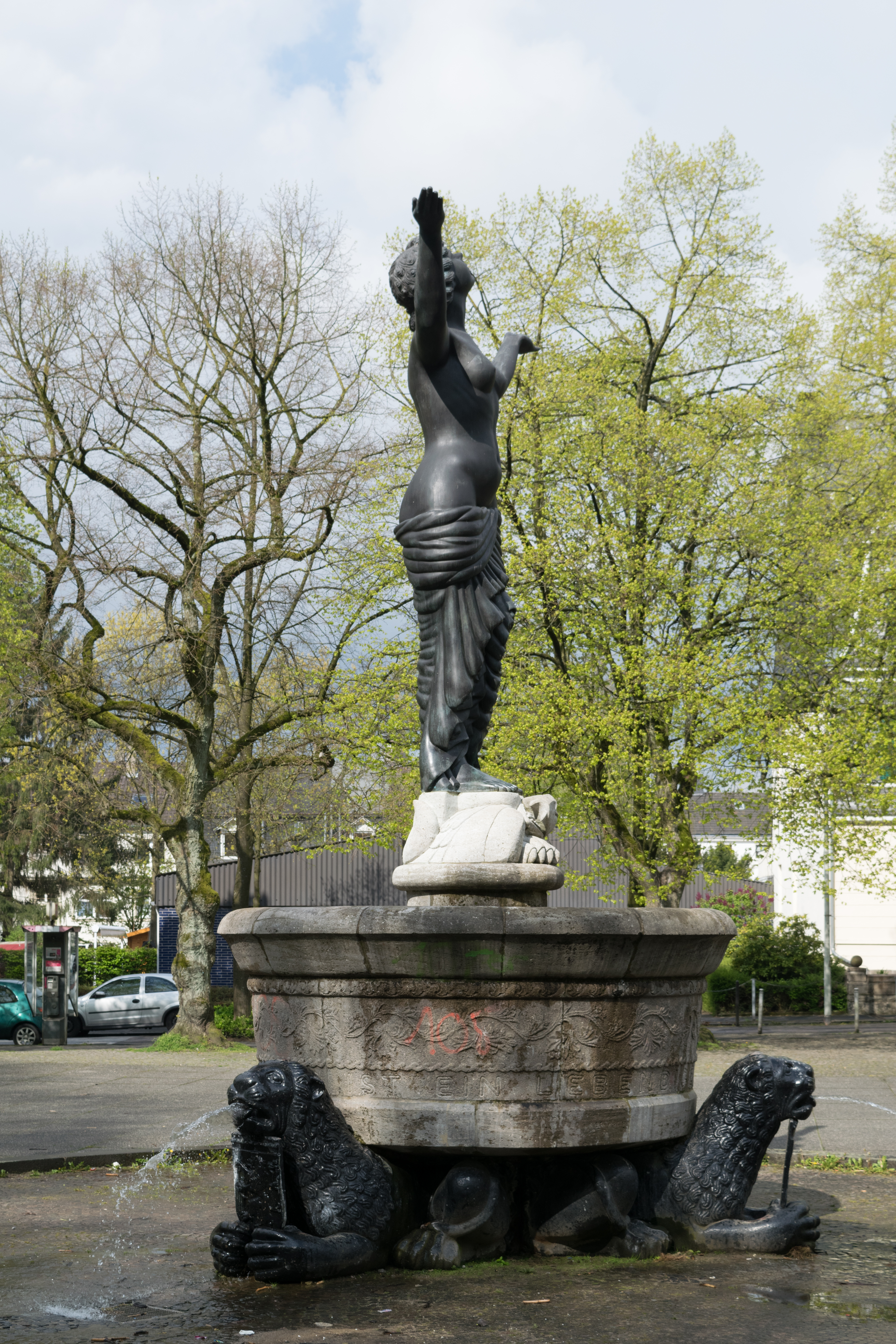 Platz der Republik, Wuppertal